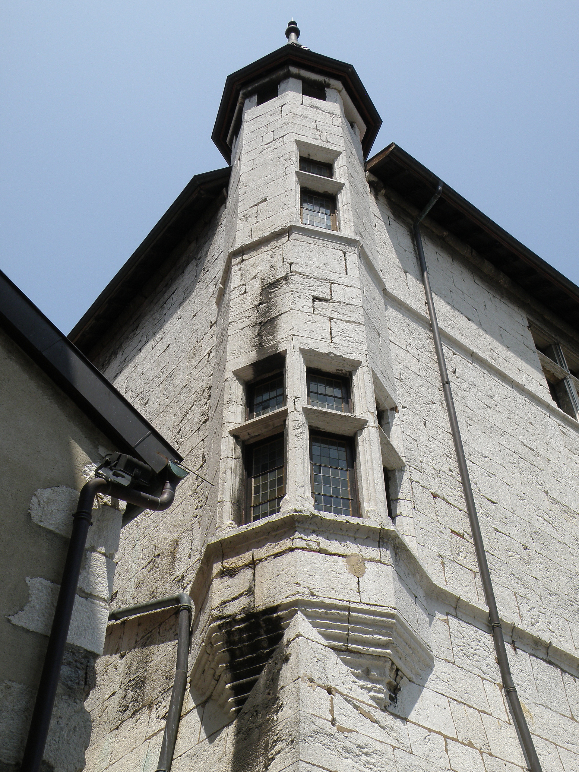 Annecy, ville et préfecture du département de la Haute-Savoie (région Rhône-Alpes, France). Le château : le logis Nemours avec son échauguette.